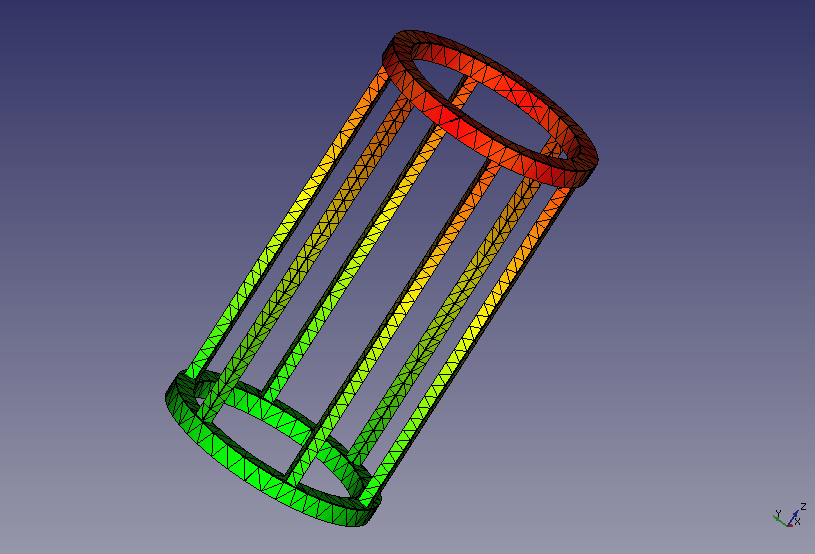 FreeCAD FEM workbench example.